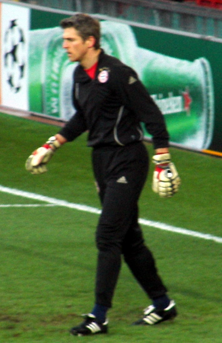 Hans-Jörg Butt